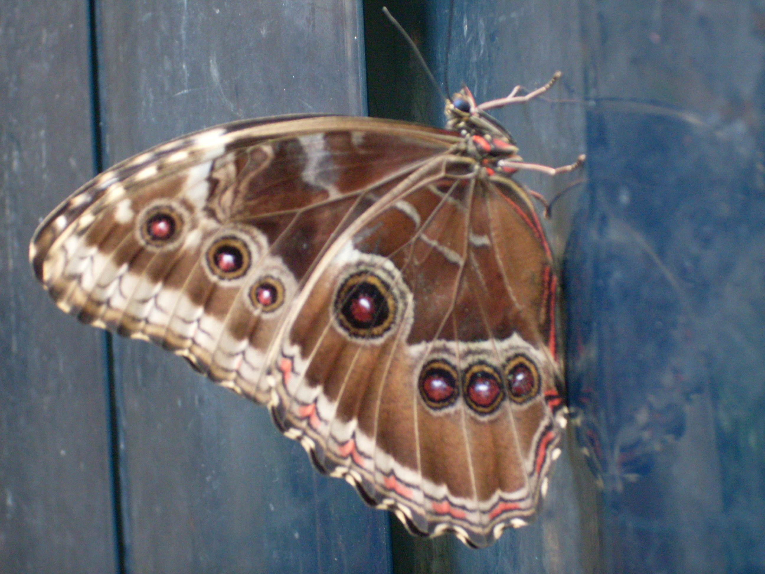 Morpho peleides les ailes fermées, Stratford upon Avon, Butterfly Farm